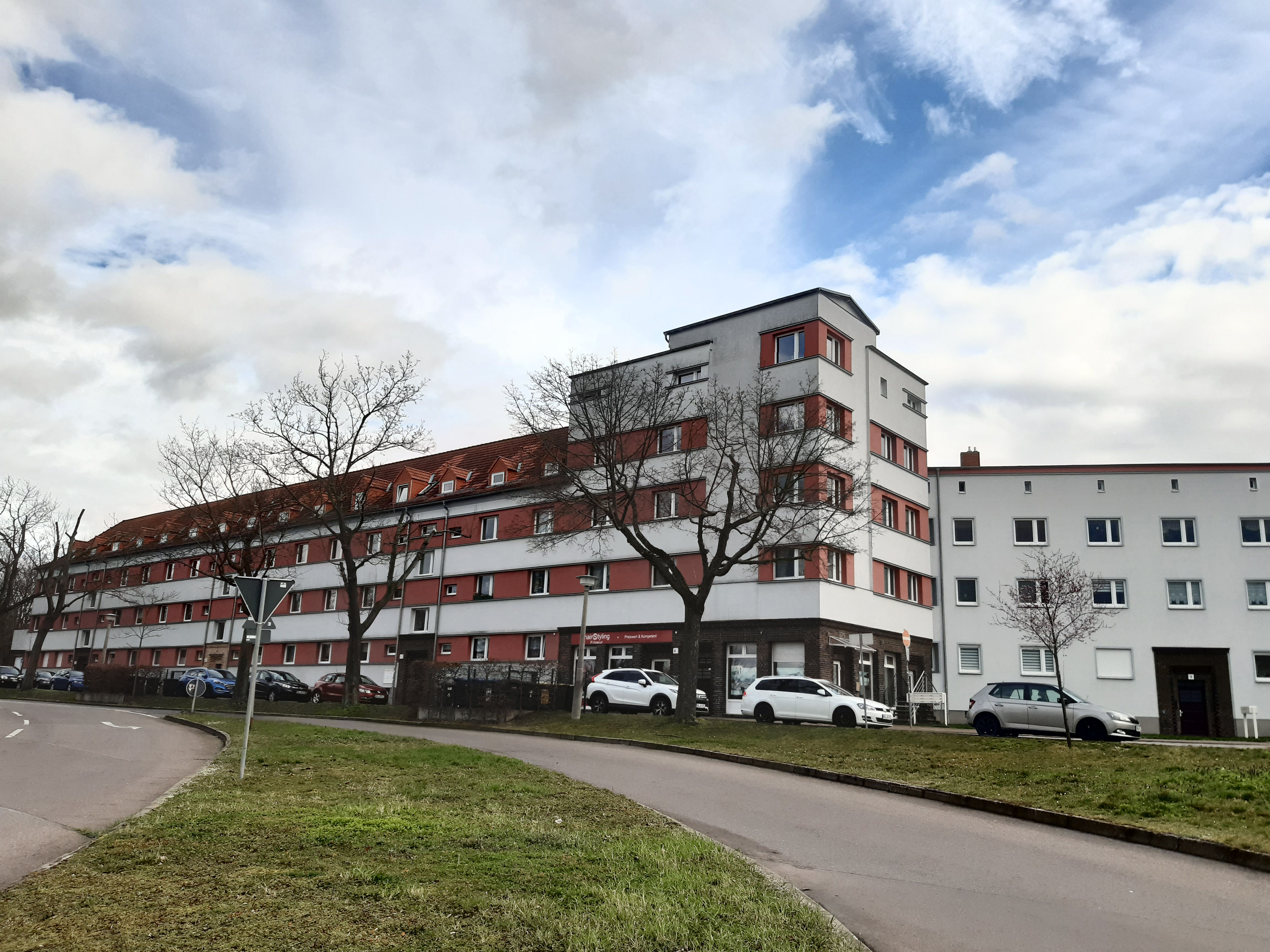 Häuserkomplex Max-Lademann-Straße 1–7, hier Nr. 1–5, Halle (Saale), erbaut 1928, Architekt:Heinrich Faller